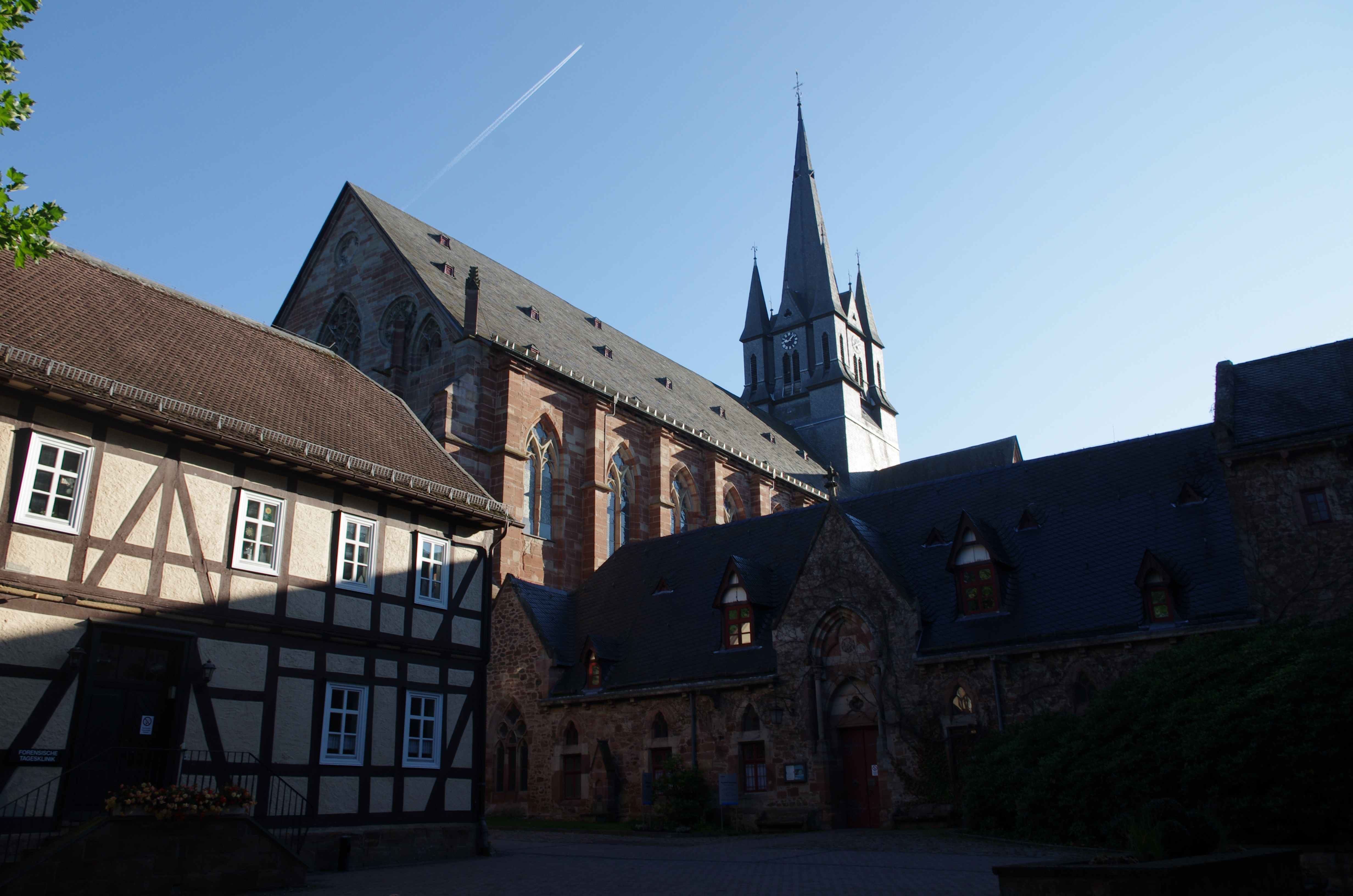 Haina (Kloster) in Hessen. Das Kloster Haina vom Kreuzgang aus.